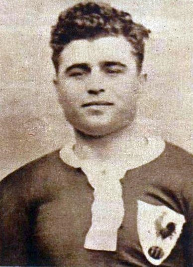 Albert Cazenave en 1928.